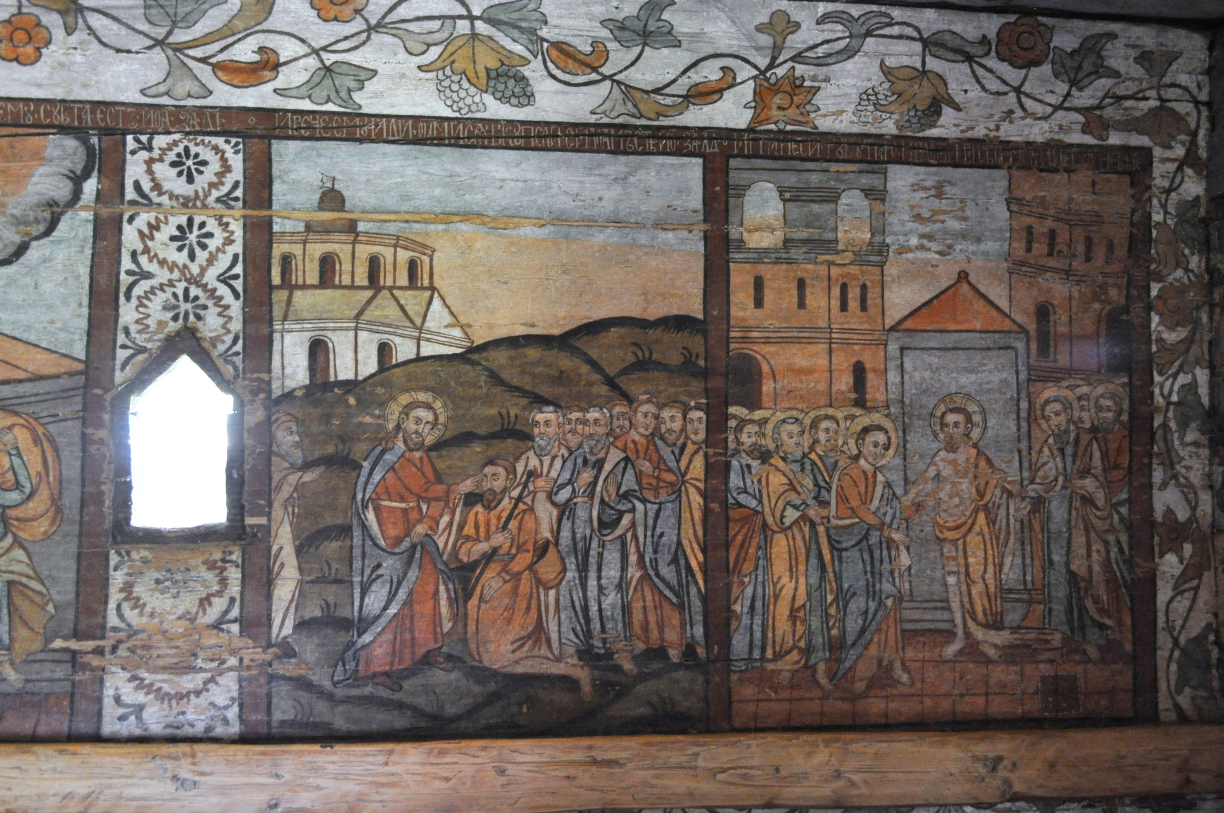 Biserica de lemn "Sfântul Nicolae", sat BOGDAN VODĂ